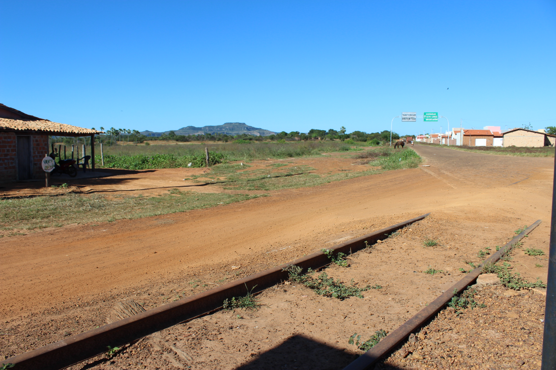 Serra de Santo Antonio, em Campo Maior, vista de um trecho que sobrou da Ferrovia Central do Piauí.